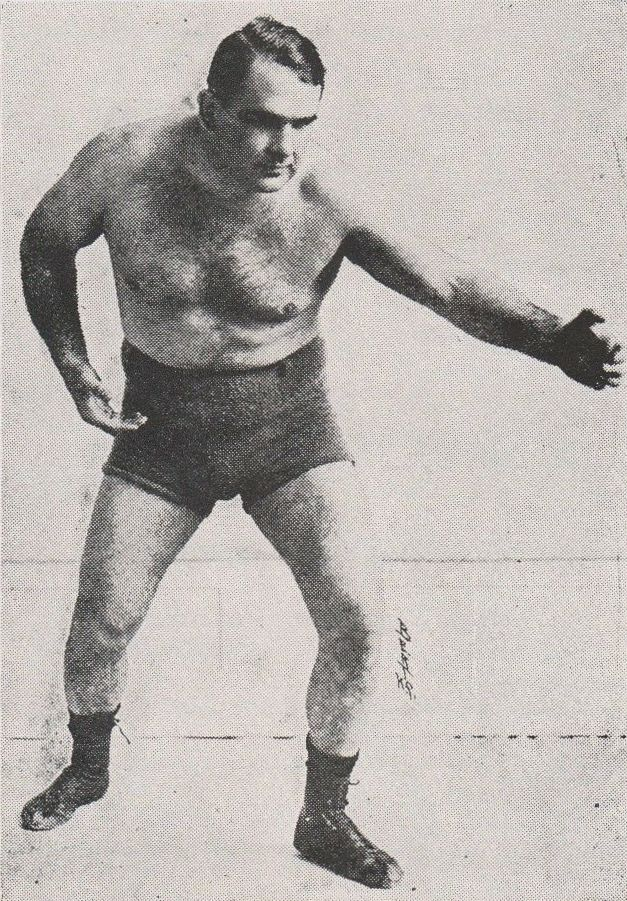 Ed "Strangler Lewis" sur un programme de catch du 6 janvier 1942.